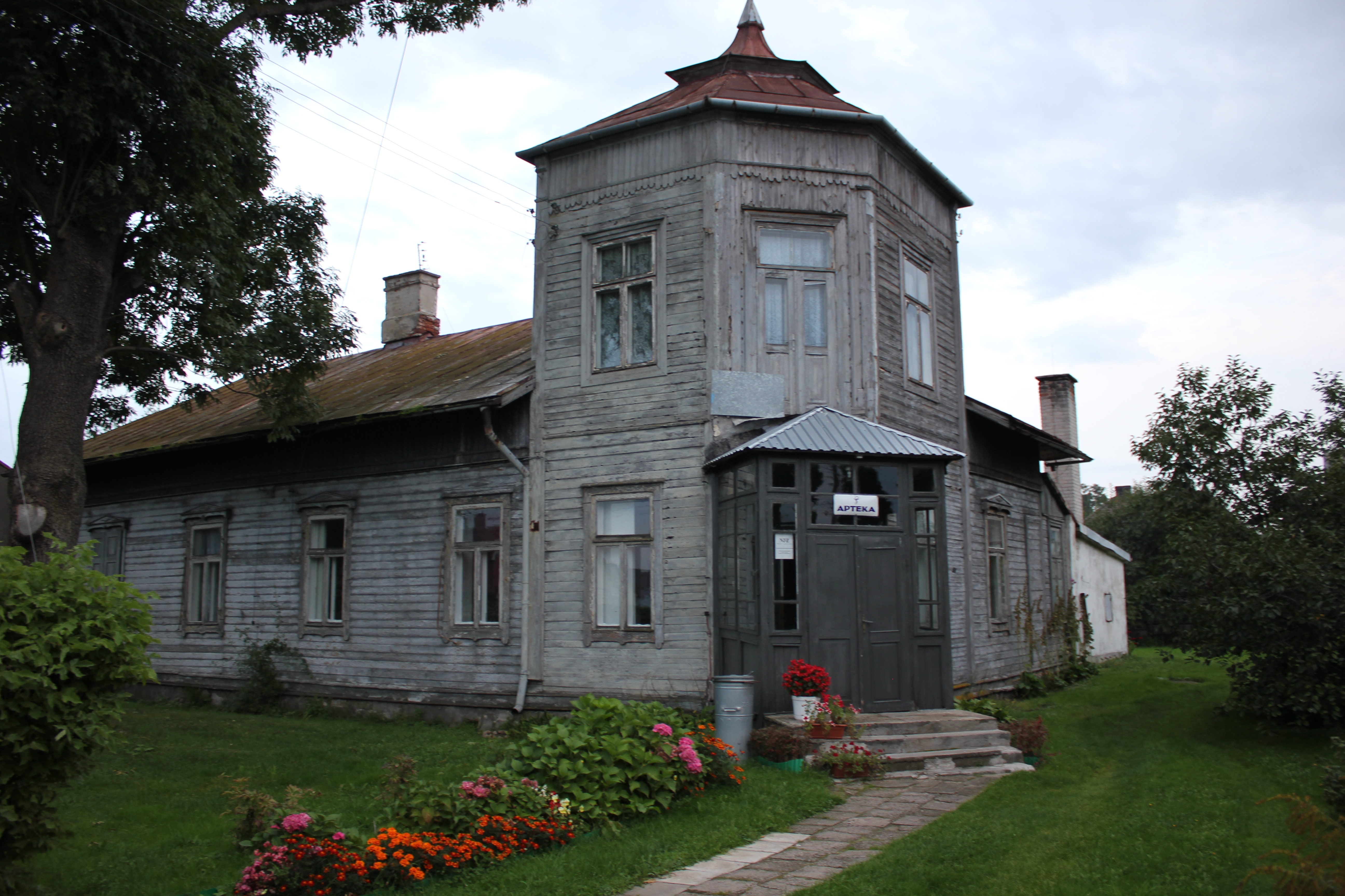 Willa, drewn., pocz. XX Czyżew-Osada, ul. Mazowiecka 12, Czyżew 04.2010.